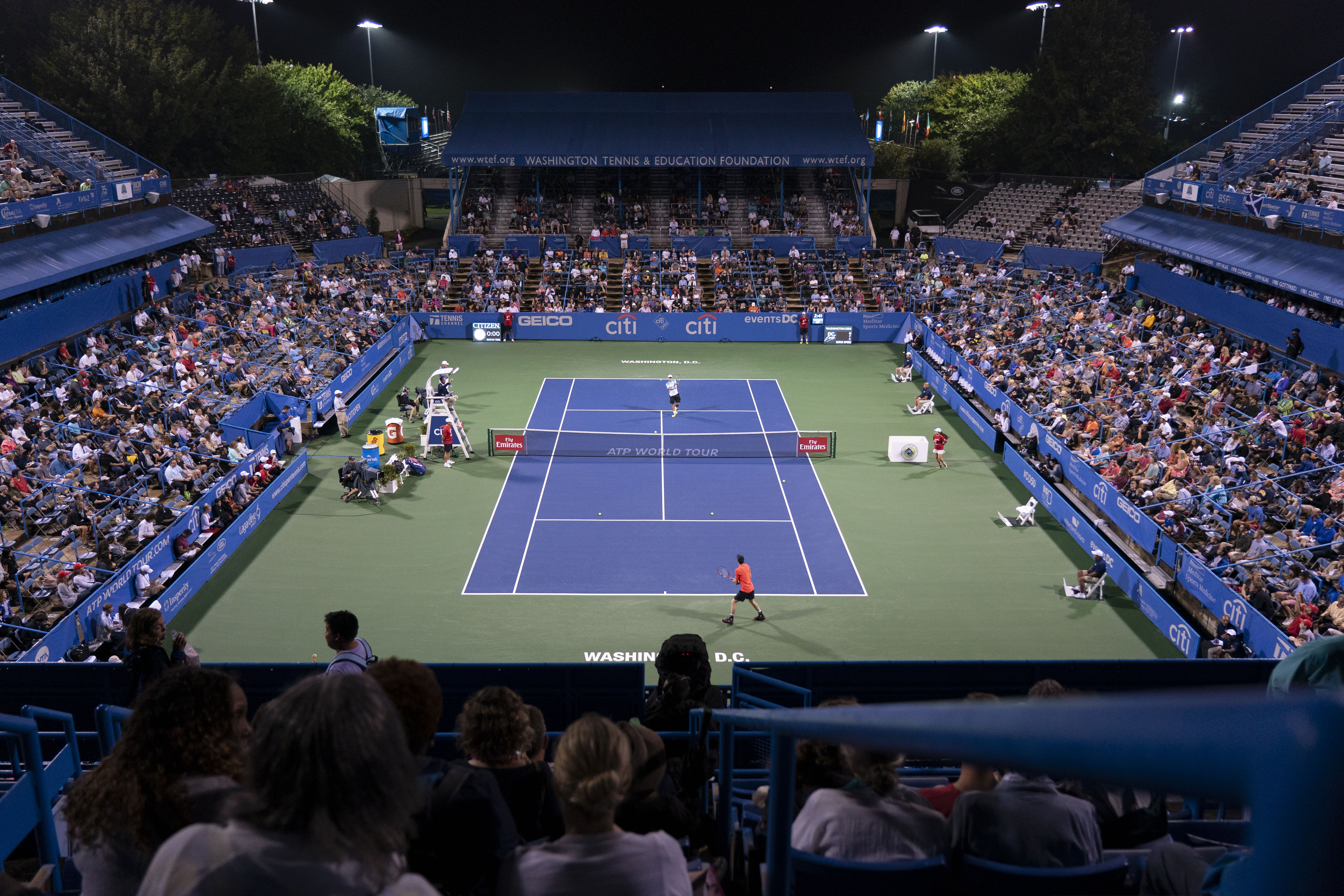 2018 Citi Open Tennis